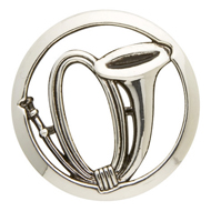 Insigne de béret des régiments de chasse